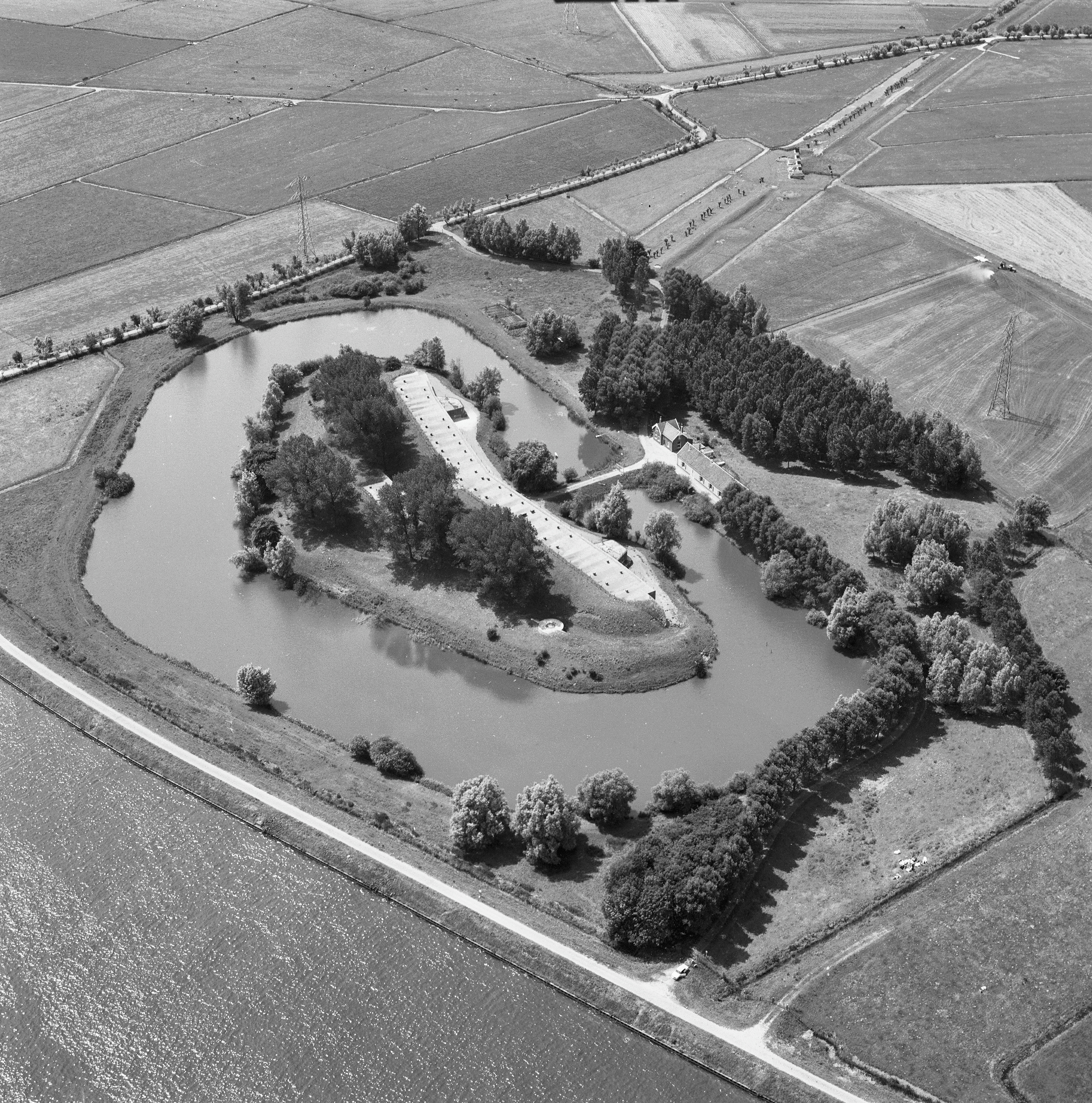 Fort Nigtevecht: Luchtfoto van fort Nigtevecht